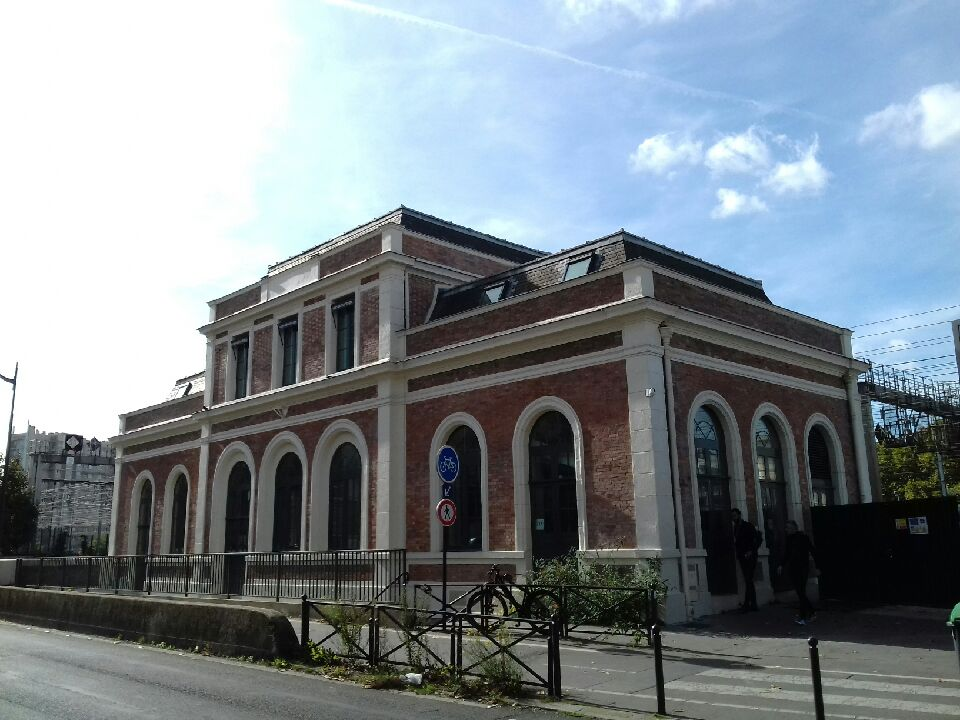 Gare Ouest-Ceinture (Paris 14e). Vue depuis la rue Vercingétorix. 4 octobre 2017